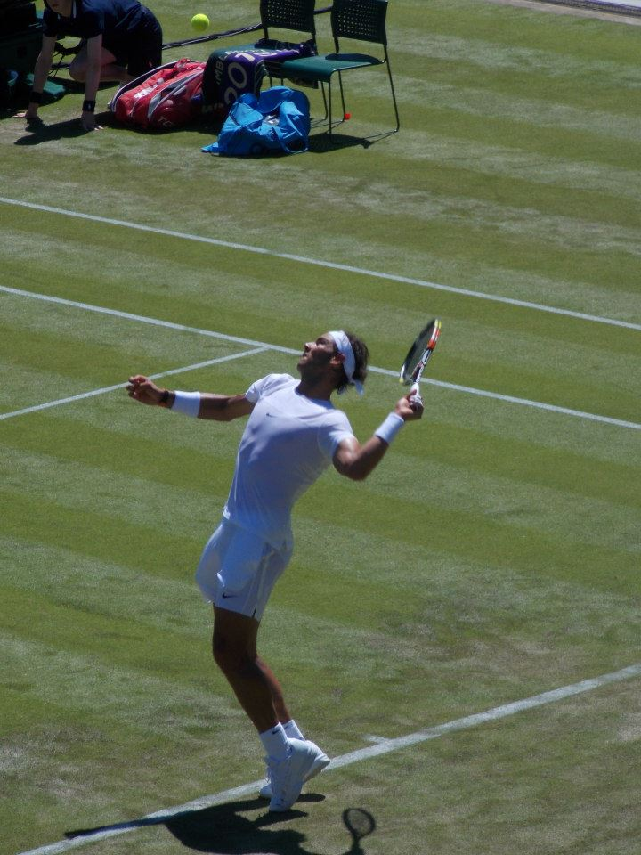 Rafael Nadal a Wimbledon 2015